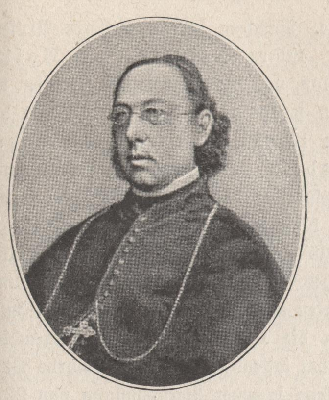 Kardinal Hergenröther